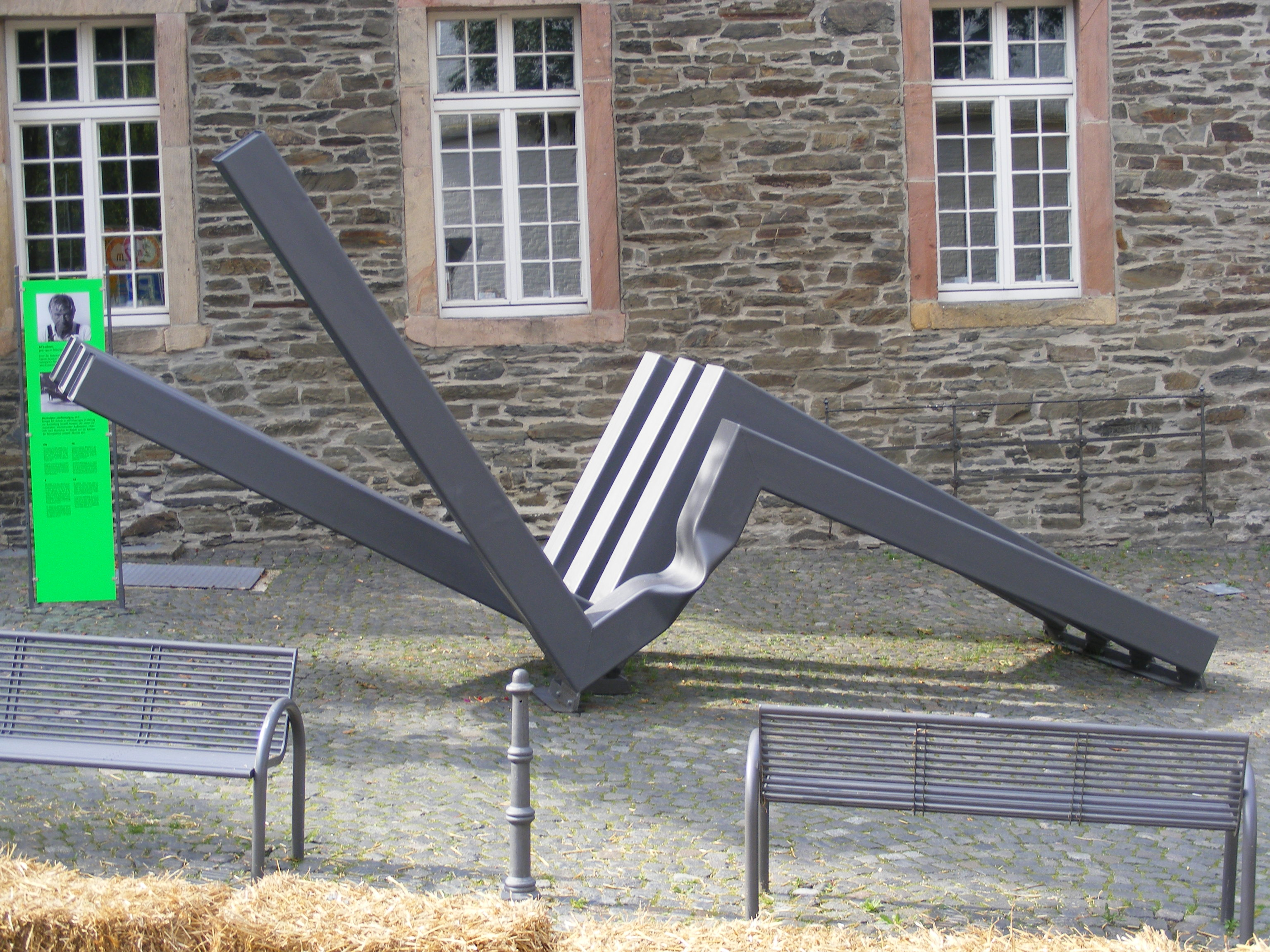 Die Skulptur Verformung 14, 17-1, fertigte Alf Lechner 1970 für die Ausstellung Umwelt-Akzente in Monschau. Zurückgekommen ist die Plastik im August 2011 im Rahmen der Retrospektive Umwelt- Aktente. Standort Monschau Am Aukloster, Austraße, Schleidener Straße.